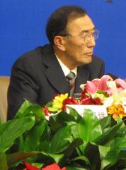 Qiangba Puncong